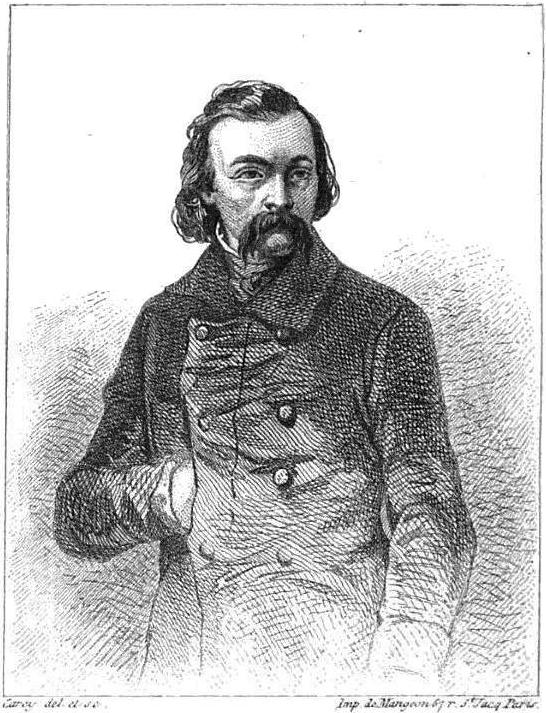 Portrait gravé de Victor Considerant.